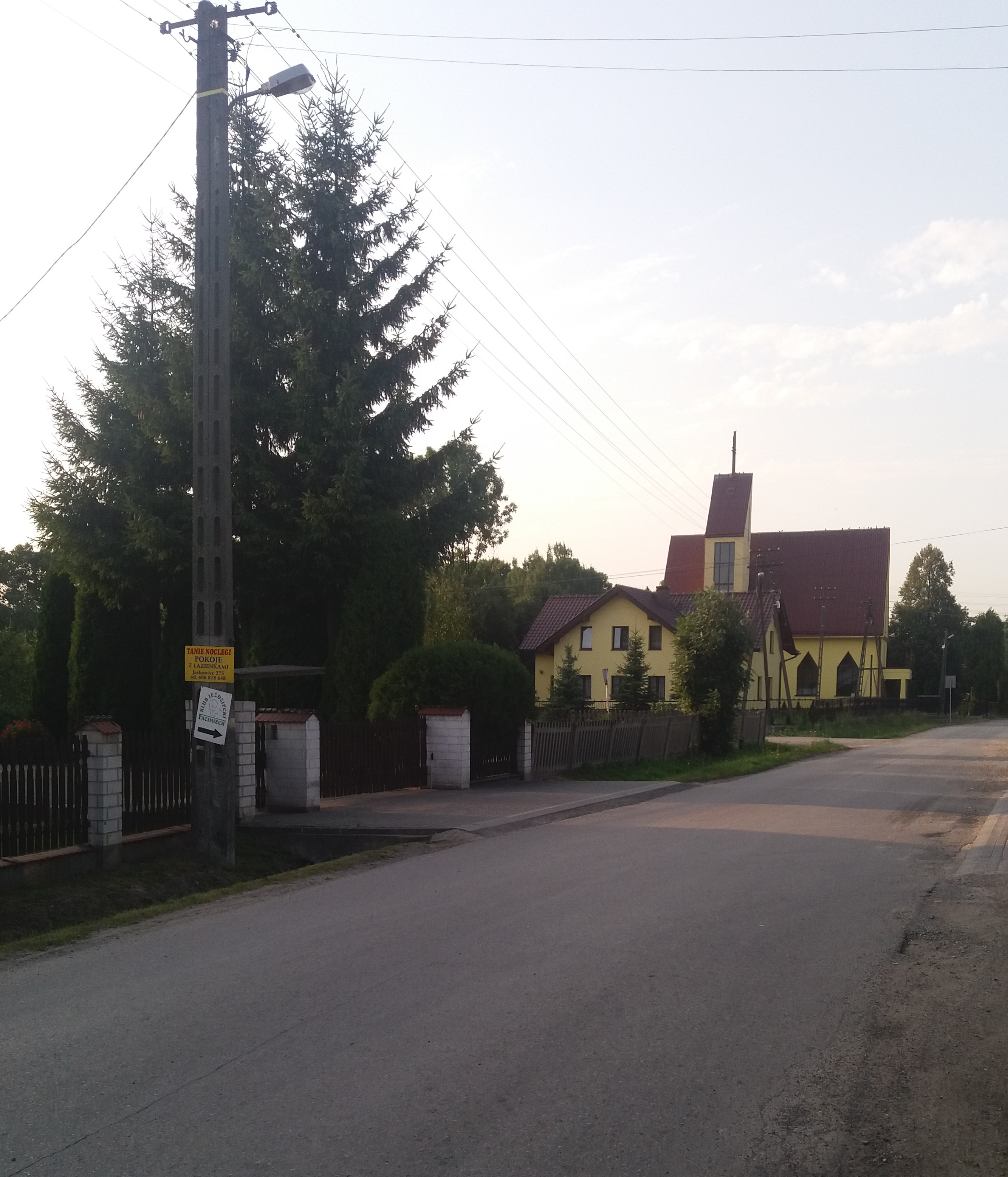 Kościół w Facimiechu z daleka